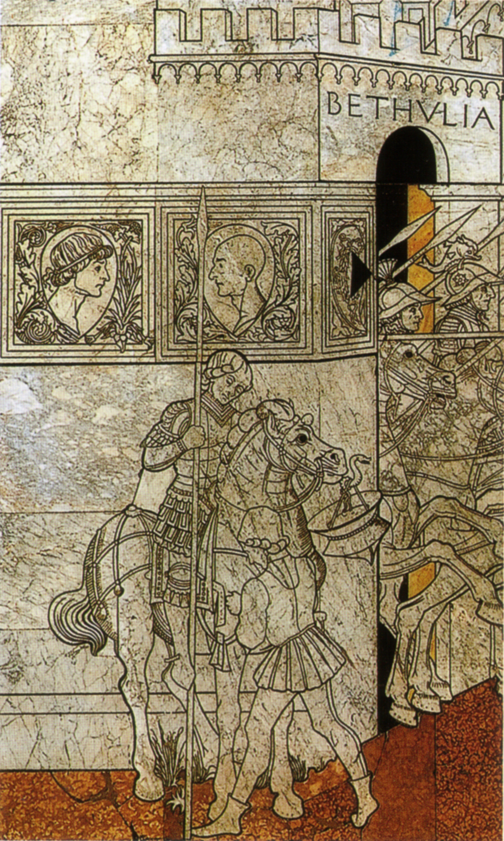 Pavimento di siena, storie di giuditta (francesco di giorgio)